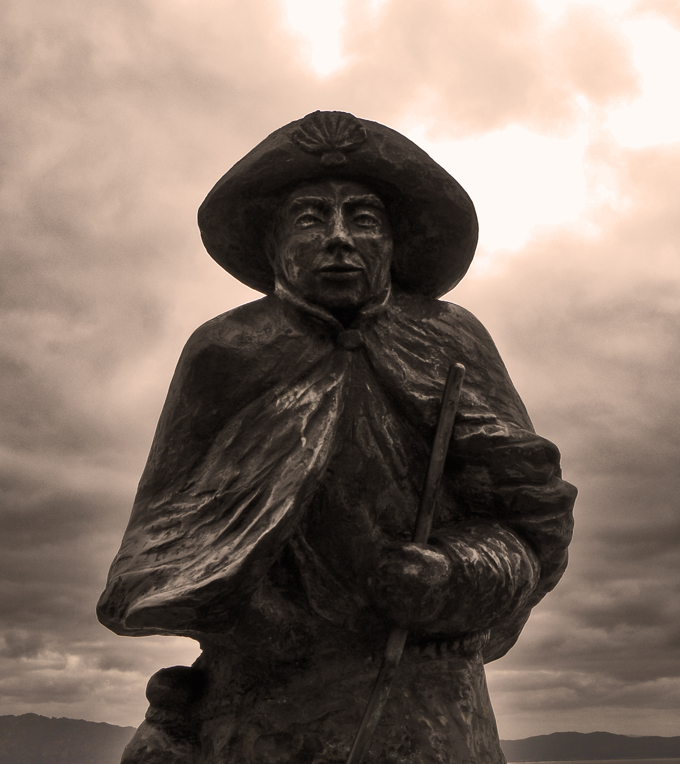 Estatua dun pelegrino en Fisterra